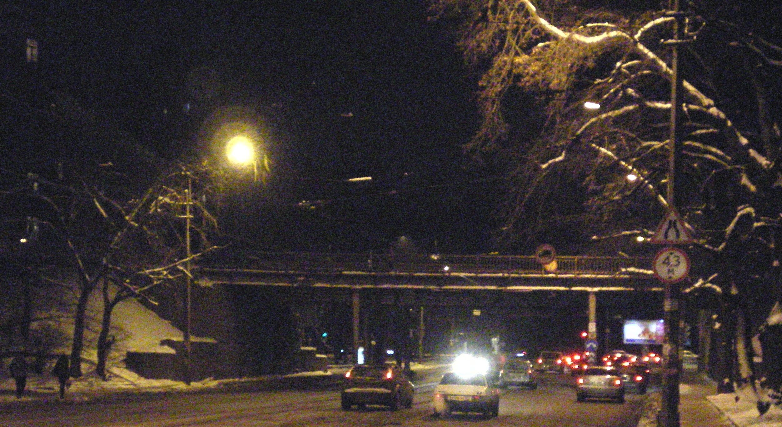 Мост станции Ланская